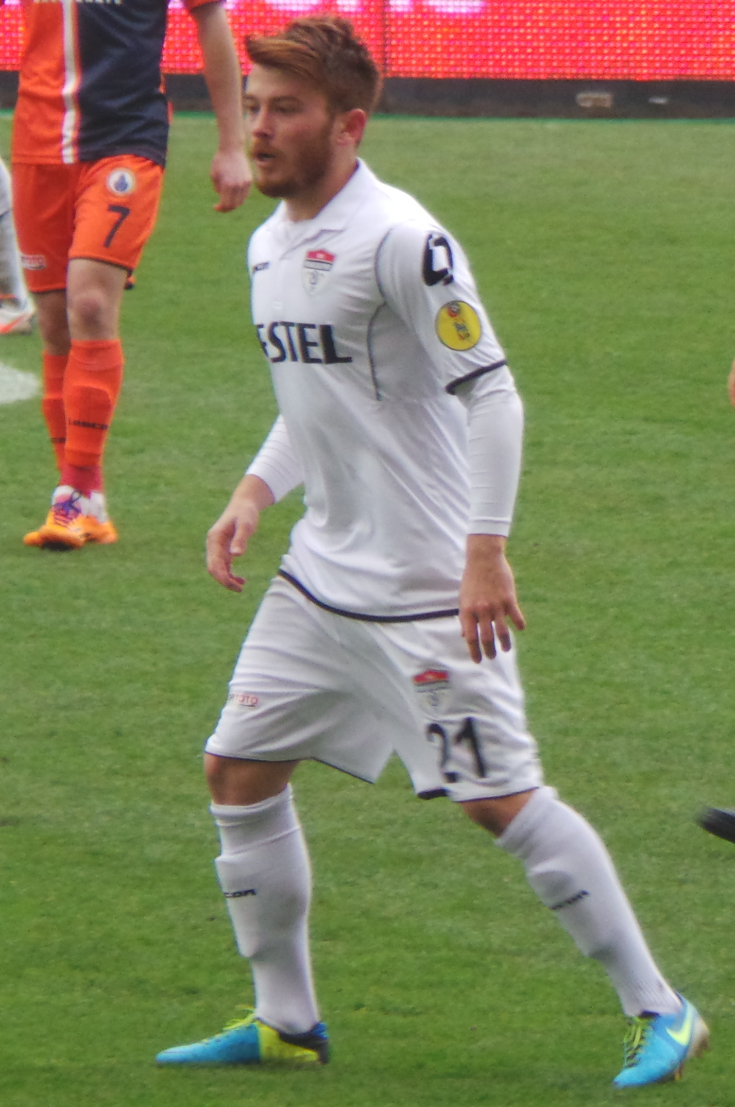 Gökay Iravul